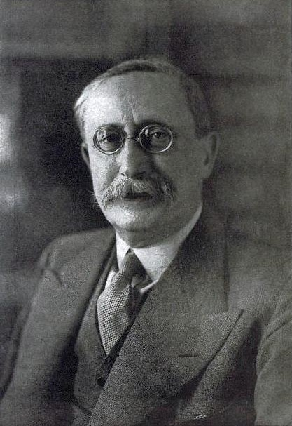 Léon Blum en 1936.